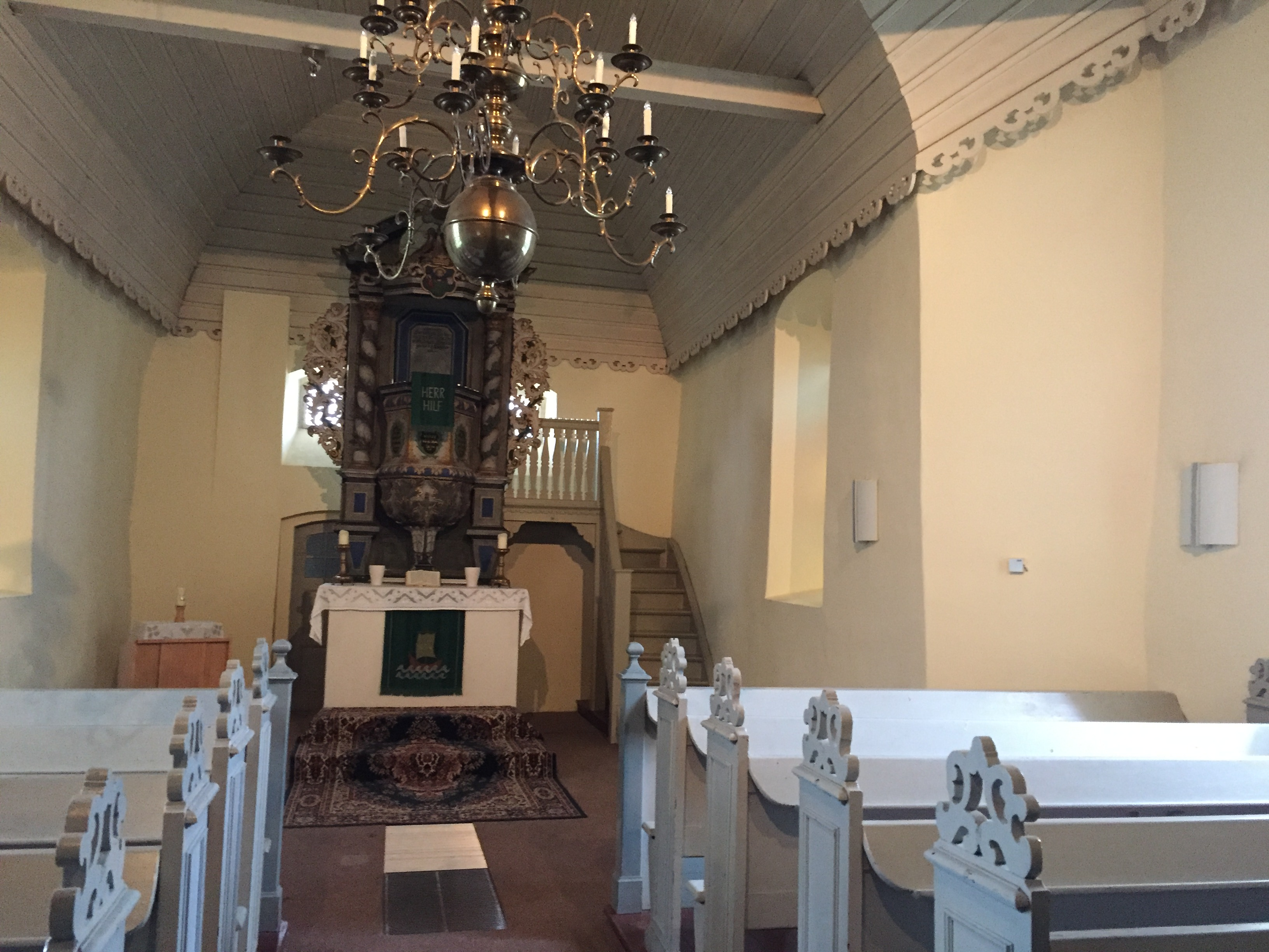 Gräningen - Kirche innen